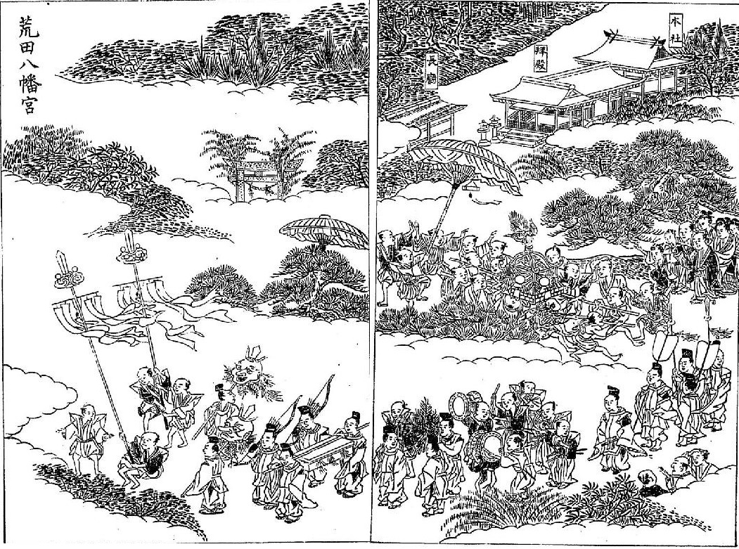 三国名勝図会第三巻に掲載されている荒田八幡宮の江戸期の絵図。